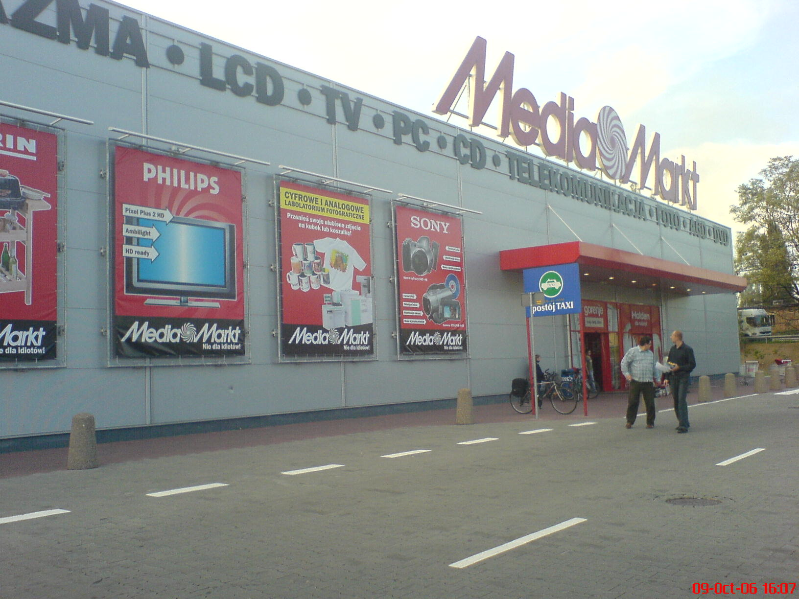 Jeden z hipermarketów Media Markt w Rybniku.